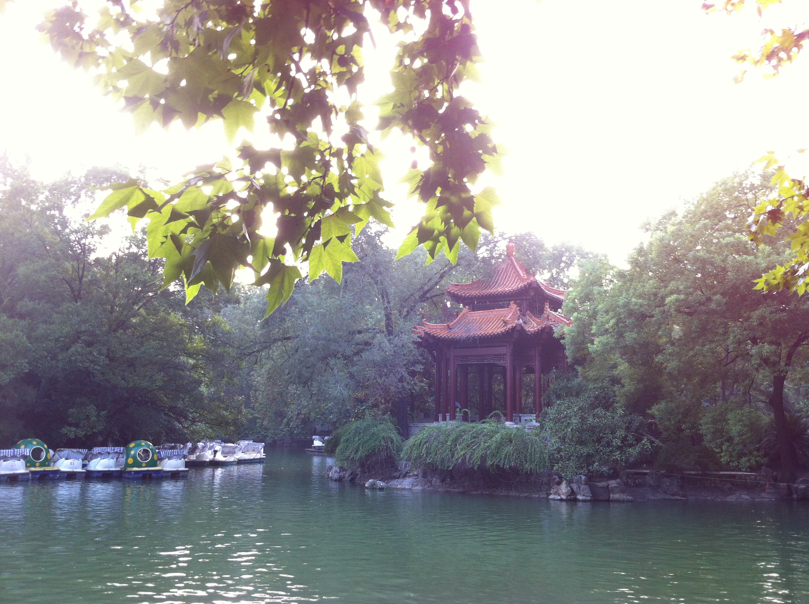 中文（中国大陆）: 武汉中山公园胜春亭